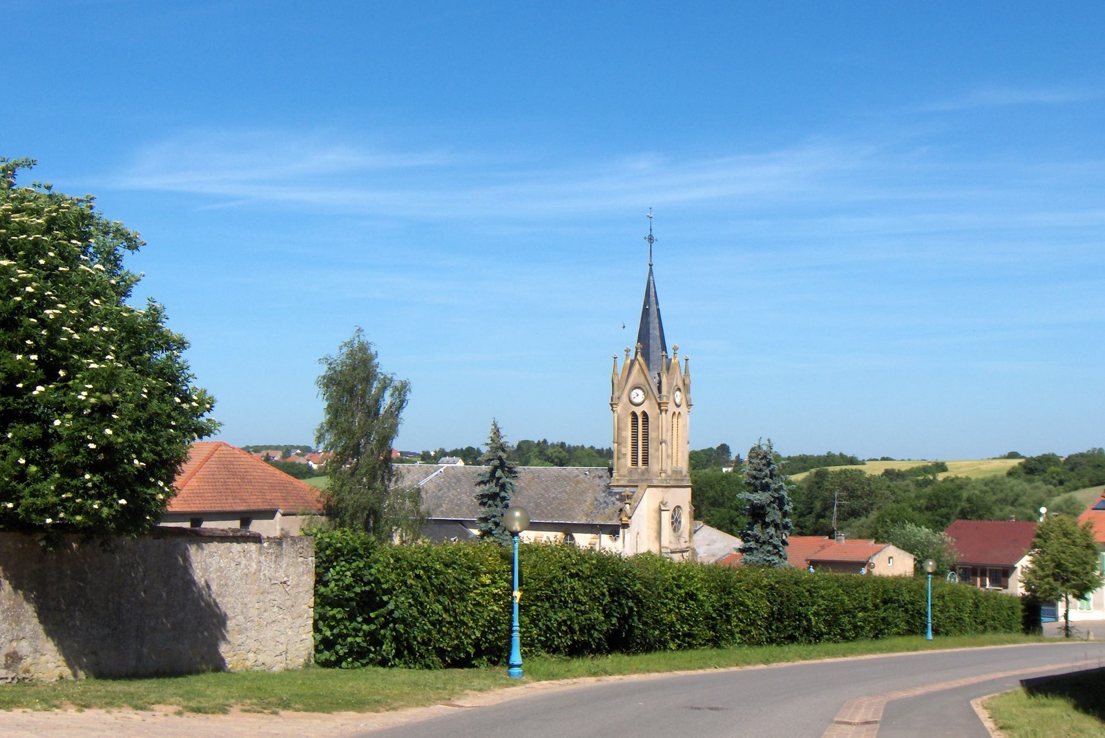 Cherisey (Departement Moselle, Frankreich), Dorfmitte